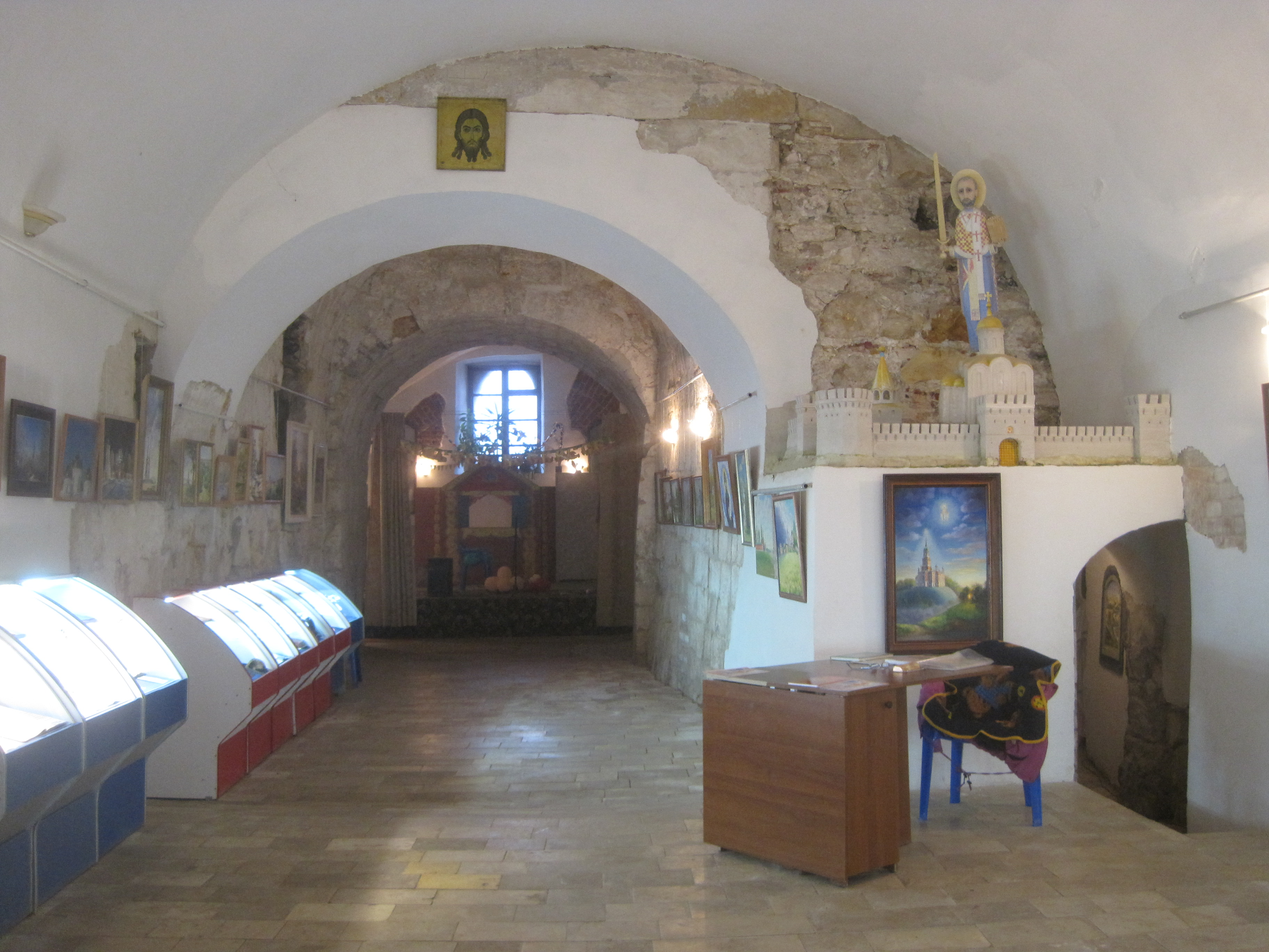 Кремлевские ворота в подклете собора